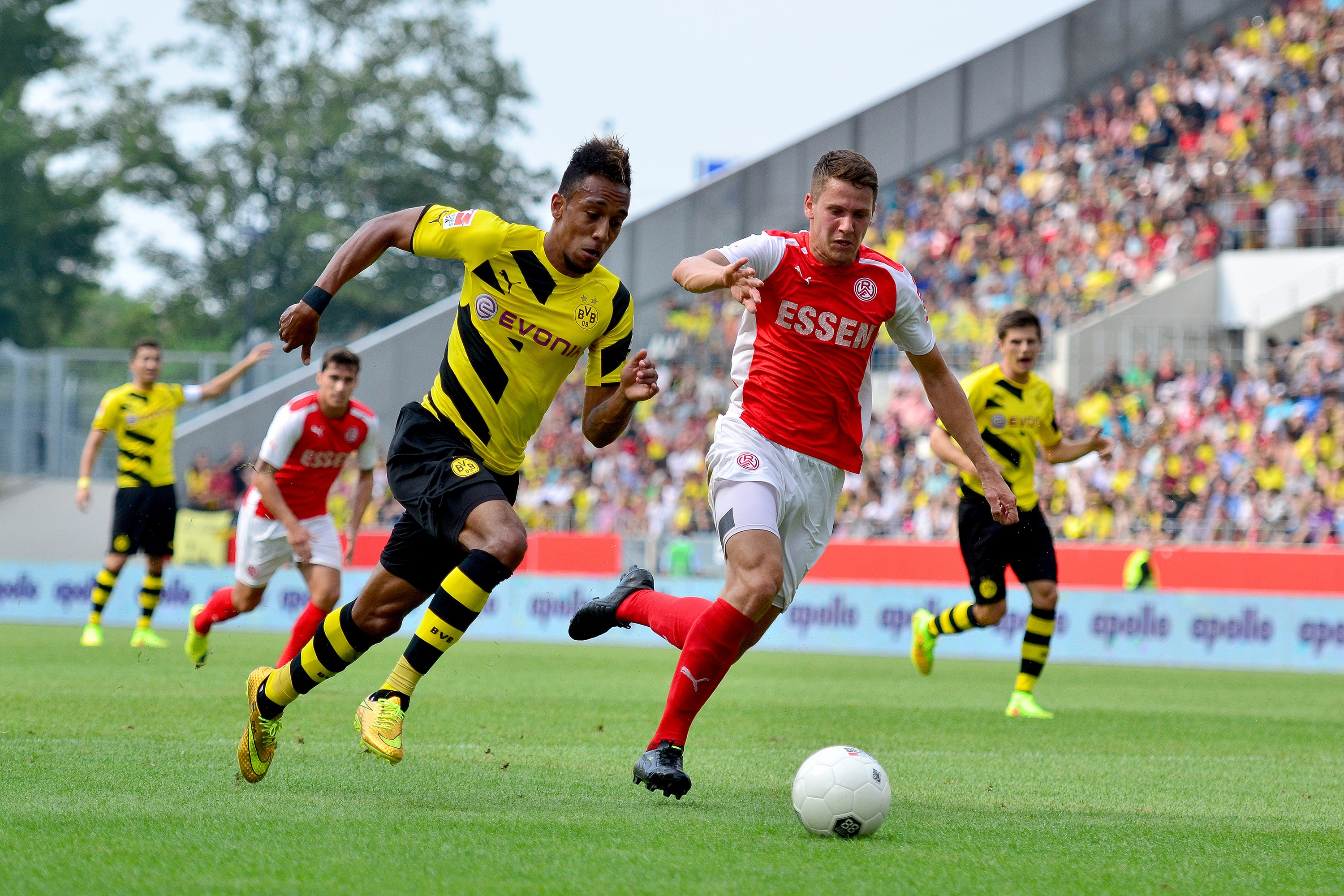 Fußball-Testspiel BVB 09 Borussia Dortmund - Rot-Weiss Essen, Datum/Uhrzeit: 27.07.2014 17:14:17Pierre-Emerick Aubameyang (Borussia Dortmund) v Marco Beier (?, Rot-Weiss Essen)